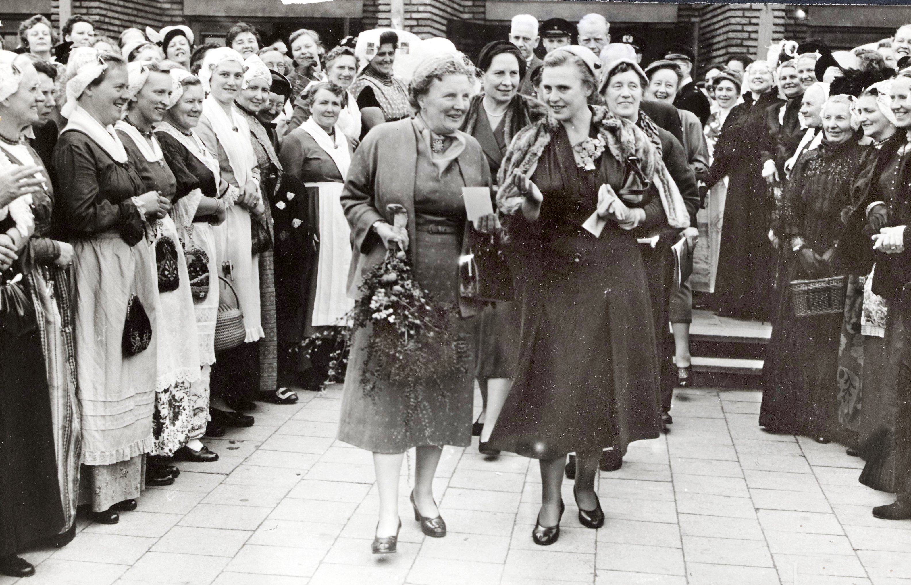 Collectie / Archief : Fotocollectie Elsevier Reportage / Serie : [ onbekend ] Beschrijving : Koningin Juliana is aanwezig bij het 25-jarig jubileum van de Nederlandse Bond van Plattelandsvrouwen. Naast haar waarschijnlijk Geerda van Beekhoff - van Selms (voorzitster NBvP). Datum : 14 oktober 1955 Locatie : Den Haag, Zuid-Holland Trefwoorden : bezoeken, bijeenkomsten, jubilea, klederdrachten Persoonsnaam : Bond van Plattelandsvrouwen, Juliana, koningin Instellingsnaam : Houtrusthallen Fotograaf : Fotograaf Onbekend / Anefo Auteursrechthebbende : Nationaal Archief Materiaalsoort : Foto (zwart/wit) Nummer archiefinventaris : bekijk toegang 2.24.05.02 Bestanddeelnummer : 015-0038